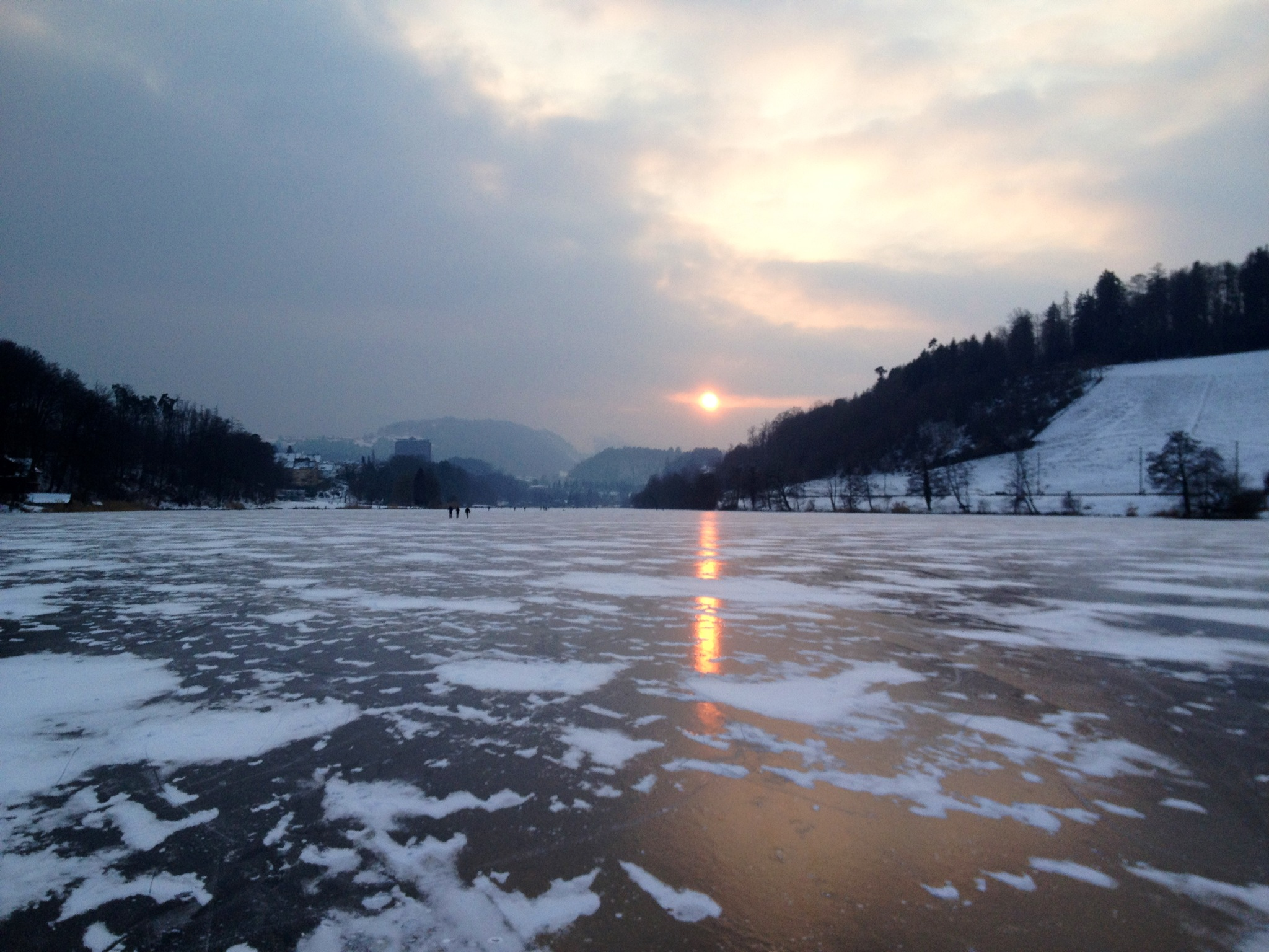 Der Rotsee war am 12. Februar 2012 von einer dicken Eisschicht bedeckt